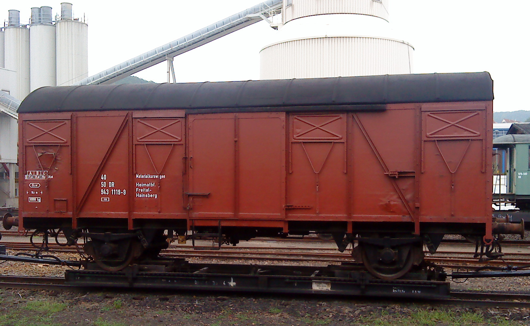 G-Wagen der DB aus den 1950er Jahren, hier als Materialkurswagen in Freital-Hainsberg